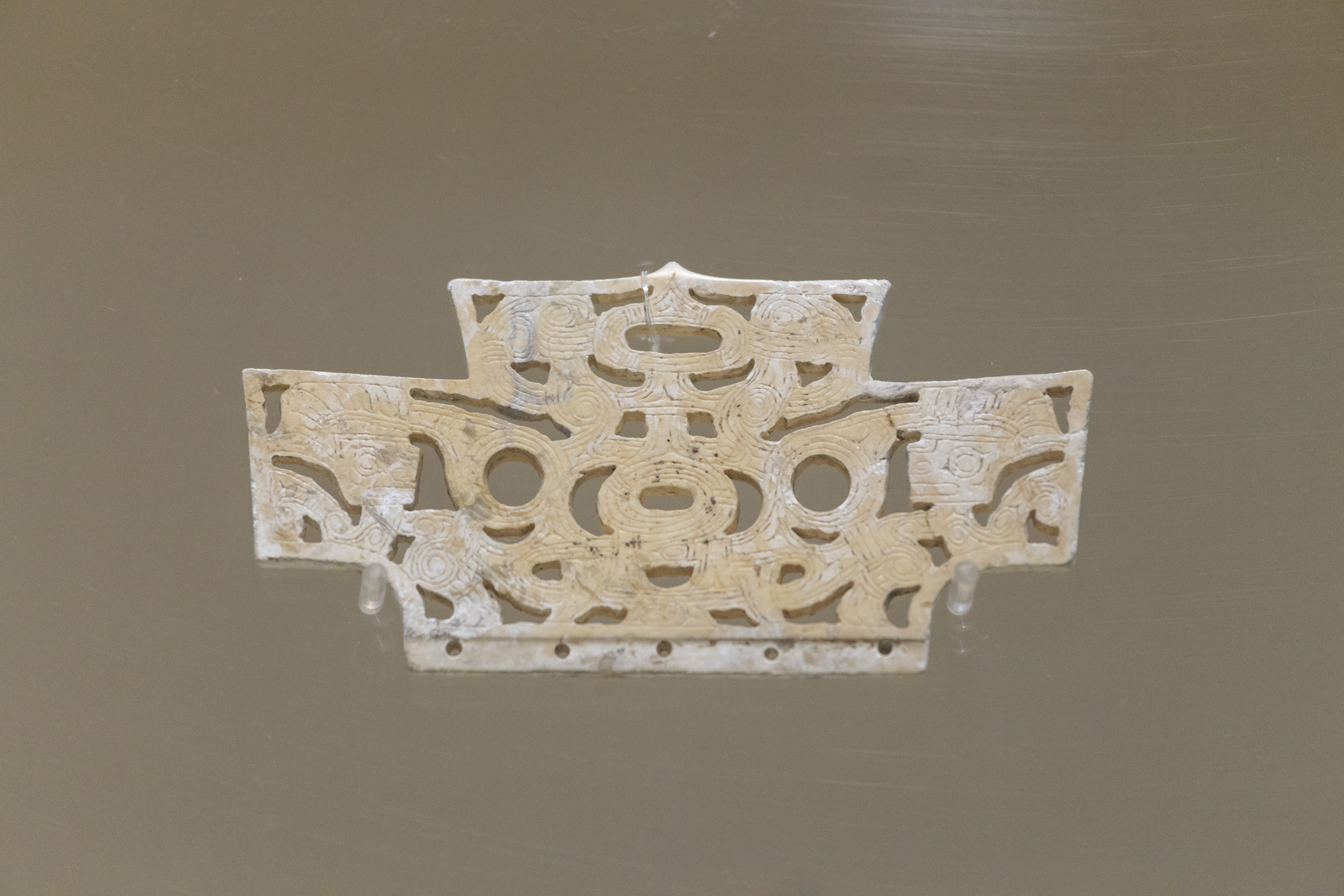 浙江省博物馆武林馆区——玉梳背，余杭良渚反山出土（良渚文化)